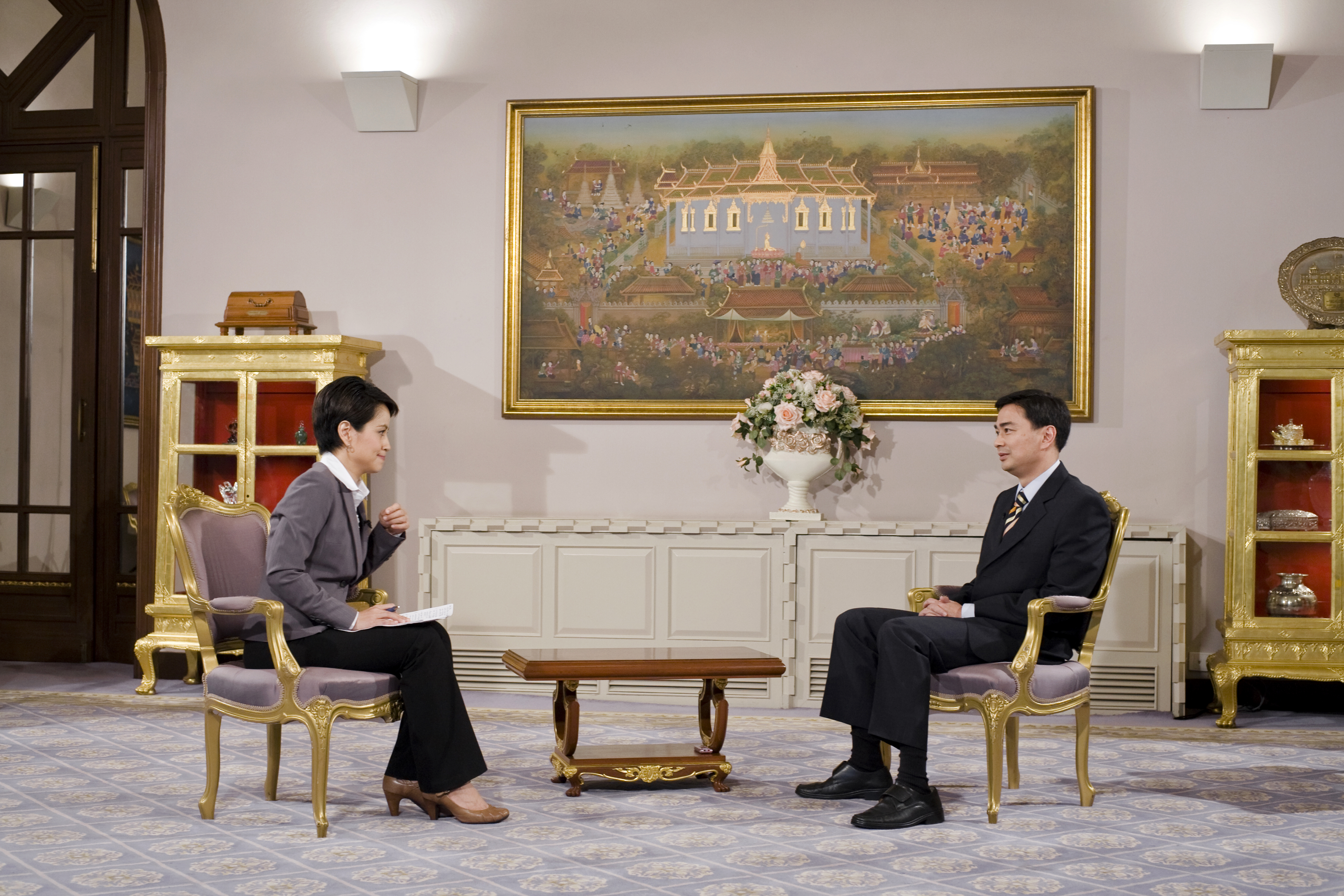 สถานีโทรทัศน์ TPBS สัมภาษณ์ นายกรัฐมนตรี ณ ห้องสีม่วง ตึกไทยคู่ฟ้า ทำเนียบรัฐบาล 7 พฤษภาคม 2553 (The Official Site of The Prime Minister of Thailand Photo by พีรพัฒน์ วิมลรังครัตน์)